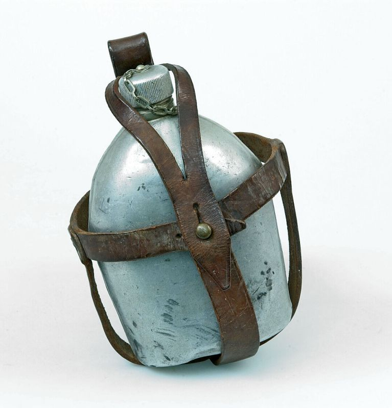 Fles. Metalen veldfles met schroefdop aan kettinkje. Om de fles heen leren banden om het te kunnen dragen met nr. 41157 erin gestansd. De leren riem zelf ontbreekt. Gebruikt tijdens lange tochten.. Tinnen veldfles met leren tuig